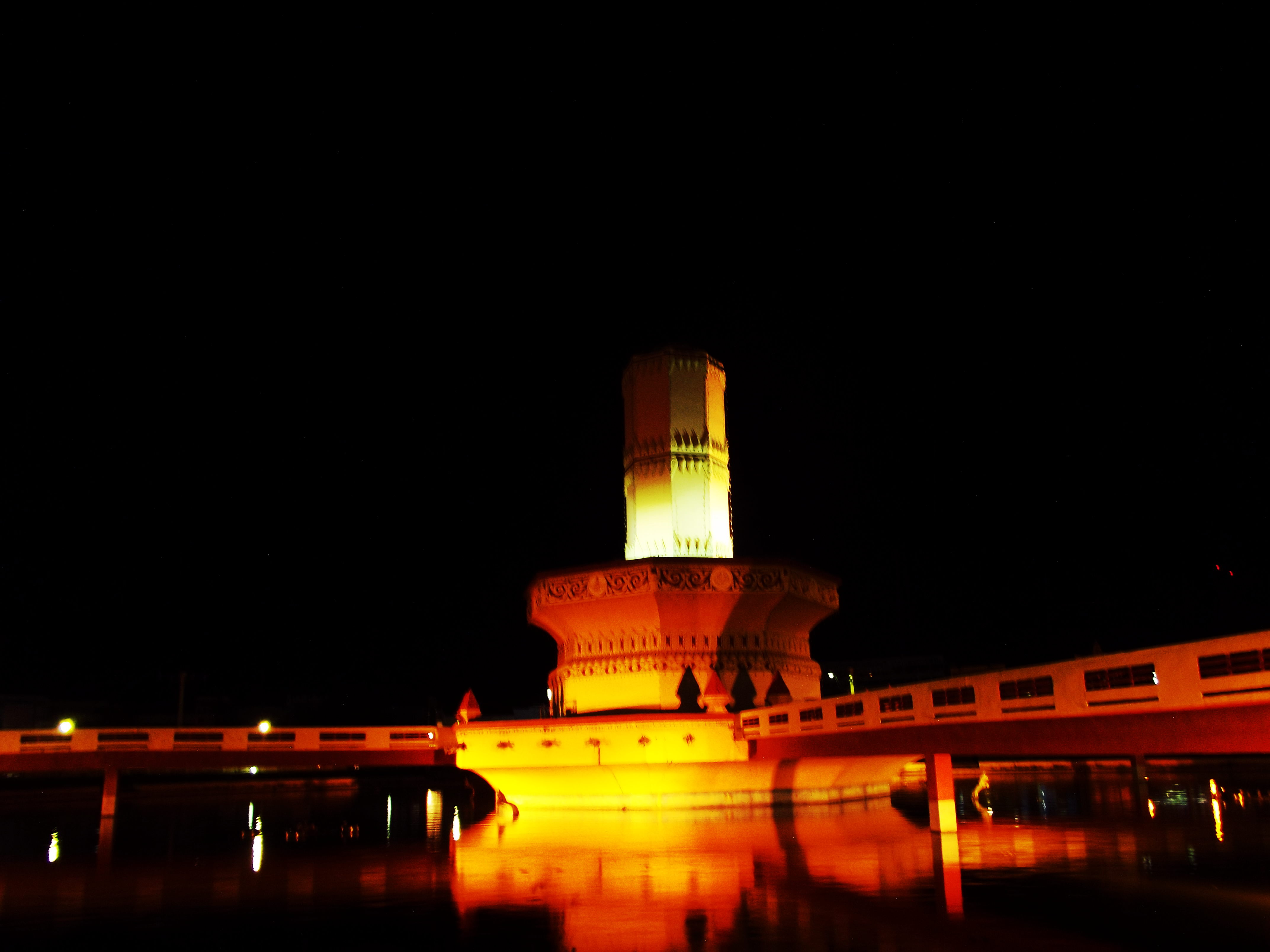 แก้วส่องแสงแห่งเมืองลิง